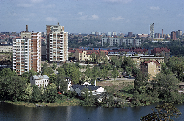 Bilden troligen från början av 1970-talet.